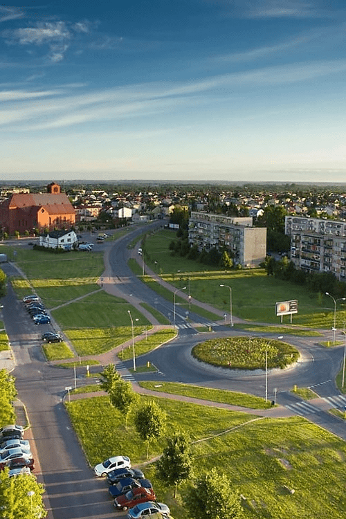 Zdjęcie przedstawiające osiedle Warszawska w tym: - Rondo - Kościół - Osiedle bloków.